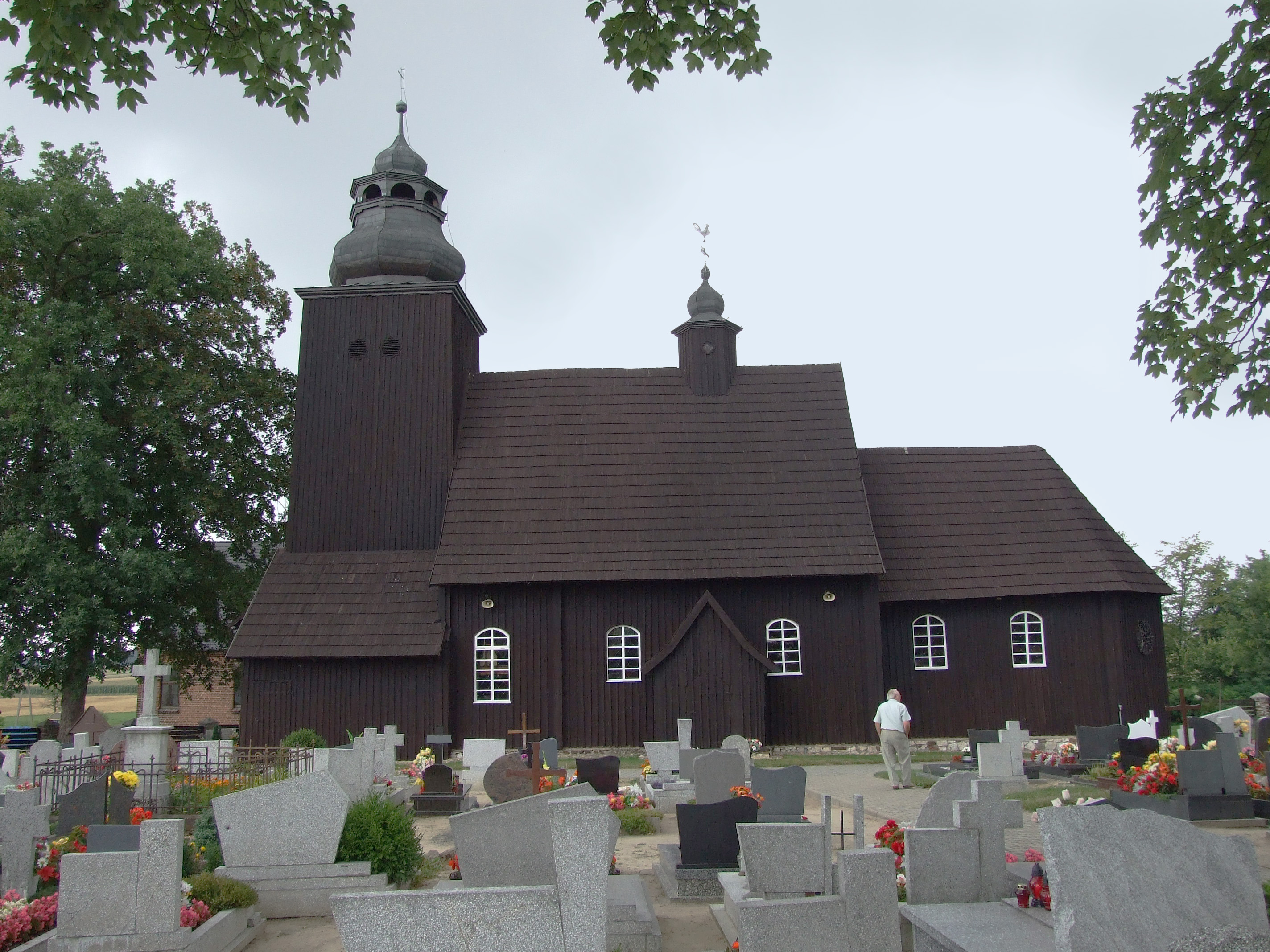 Kościół św. Jadwigi w Biskupicach (powiat oleski